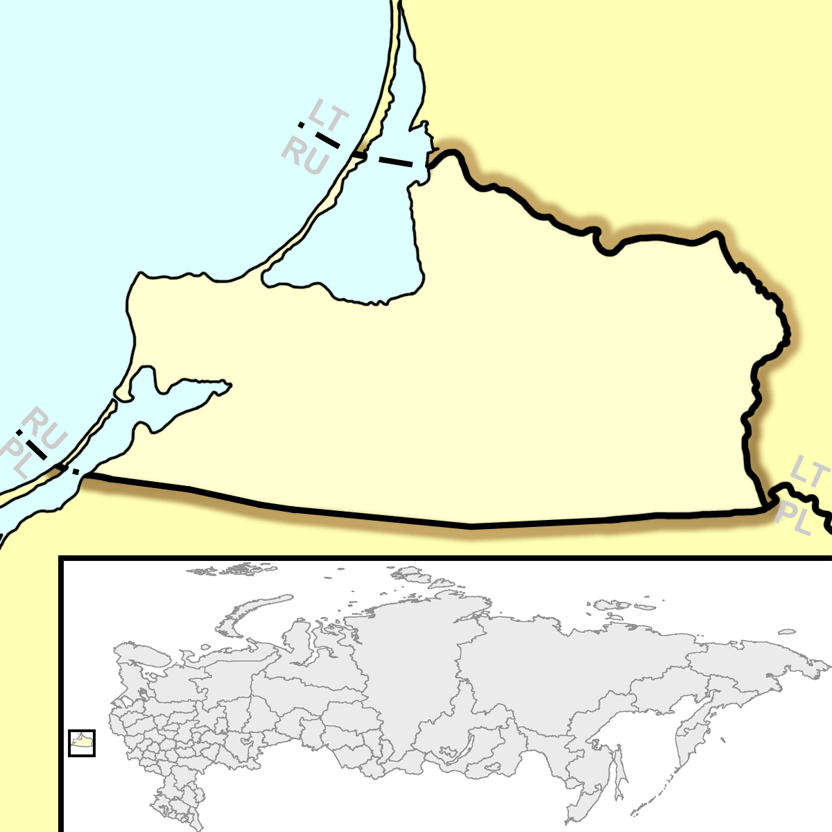 A blank map of Kaliningrad Oblast(modern style)